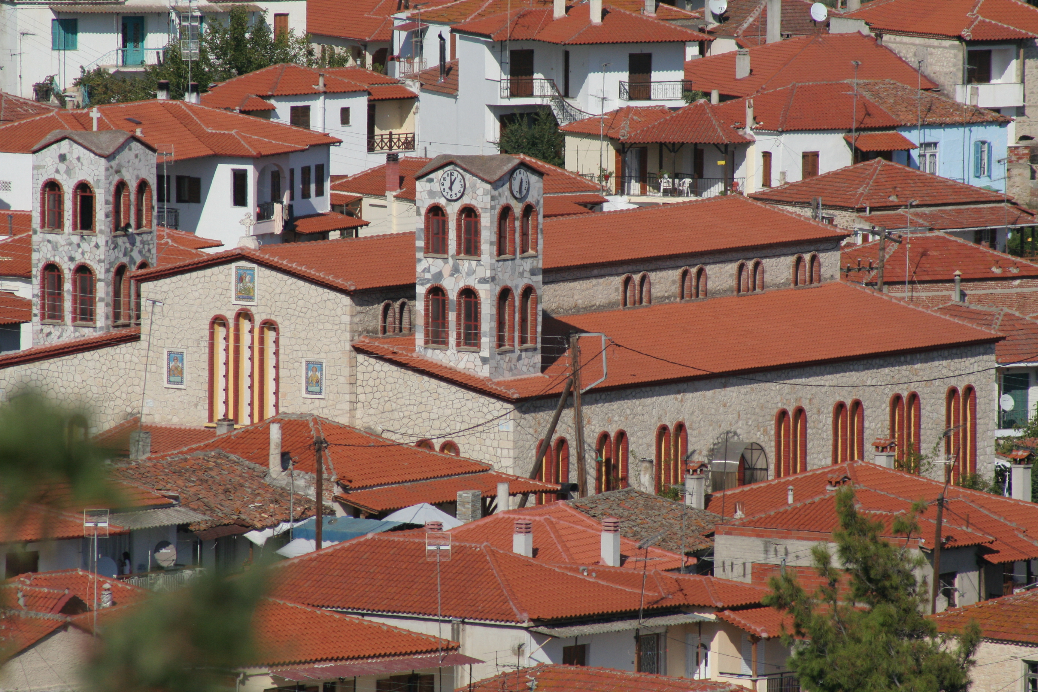 Die Kirche in Ágios Nikólaos. Teleaufnahme aus südwestlicher Richtung.